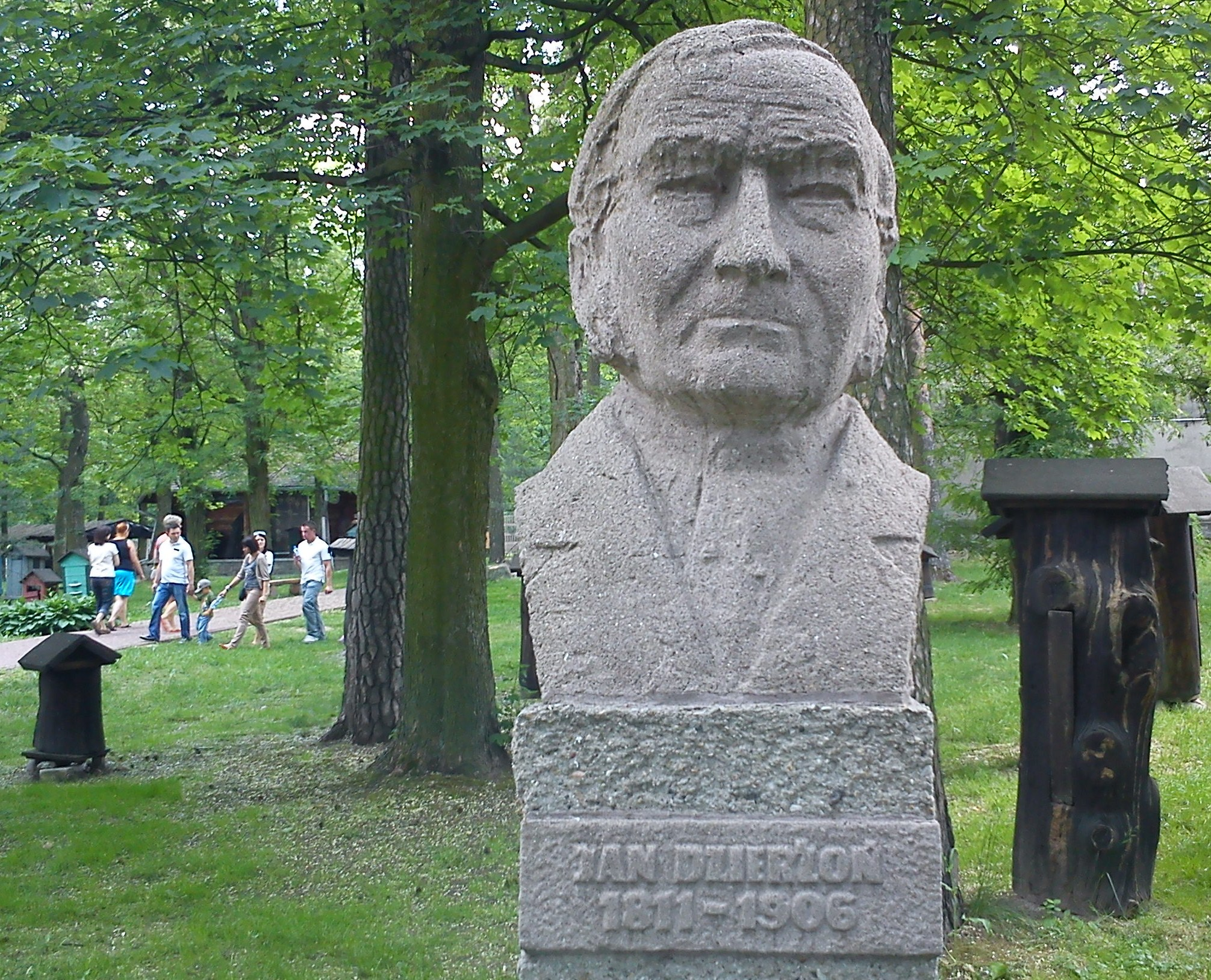 Szreniawa - pomnik Jana Dzierżona w parku pałacowym przy Muzeum Rolnictwa (zabytek nr 1804/A).